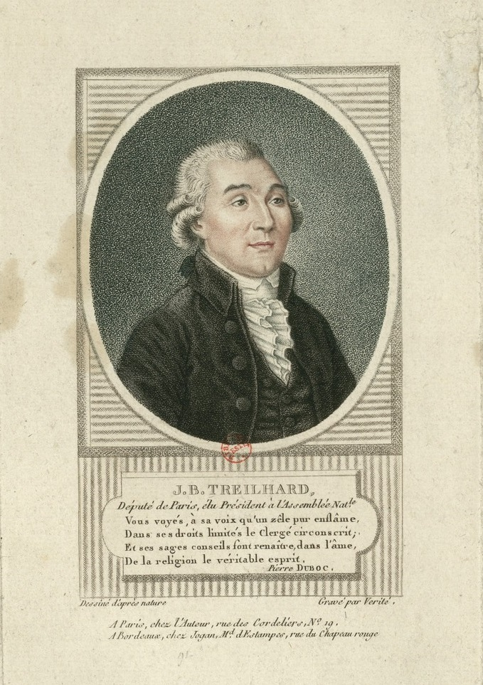 Jean-Baptiste Treilhard (1742-1810)